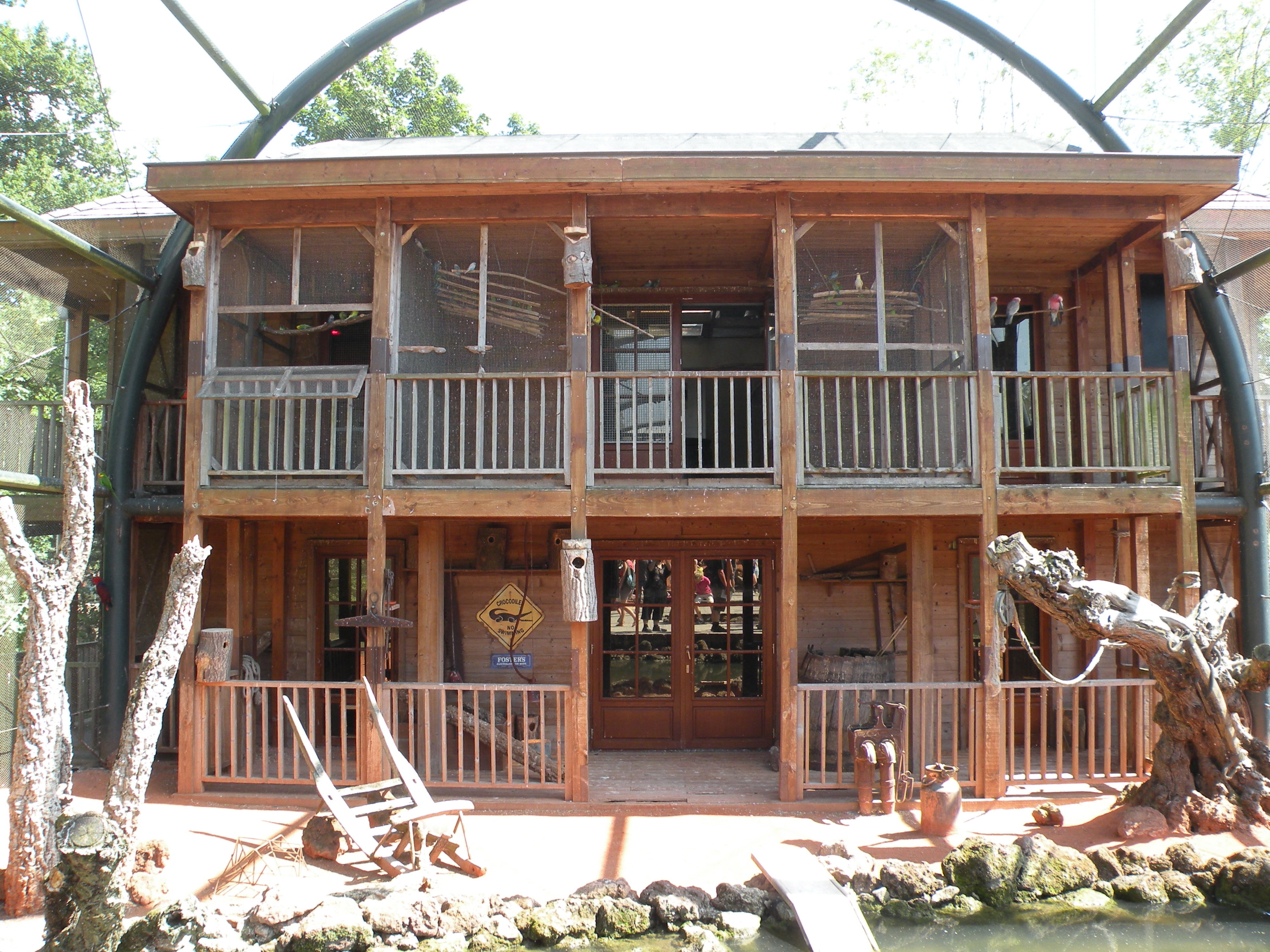 volière Pairi Daiza